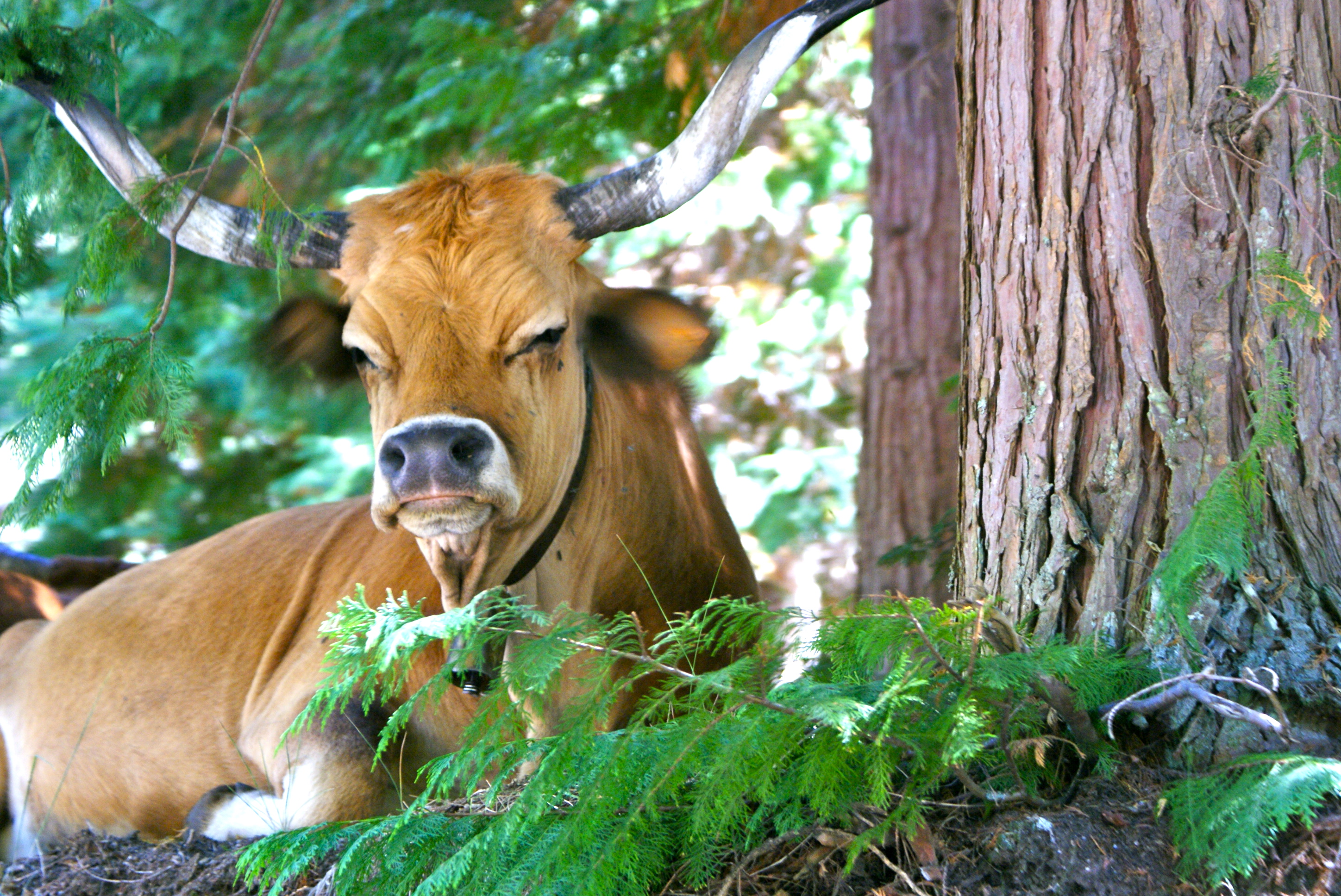 Vaca a descansar à sombra de uma árvore junto à estrada em pleno Parque Nacional Peneda-Gerês.